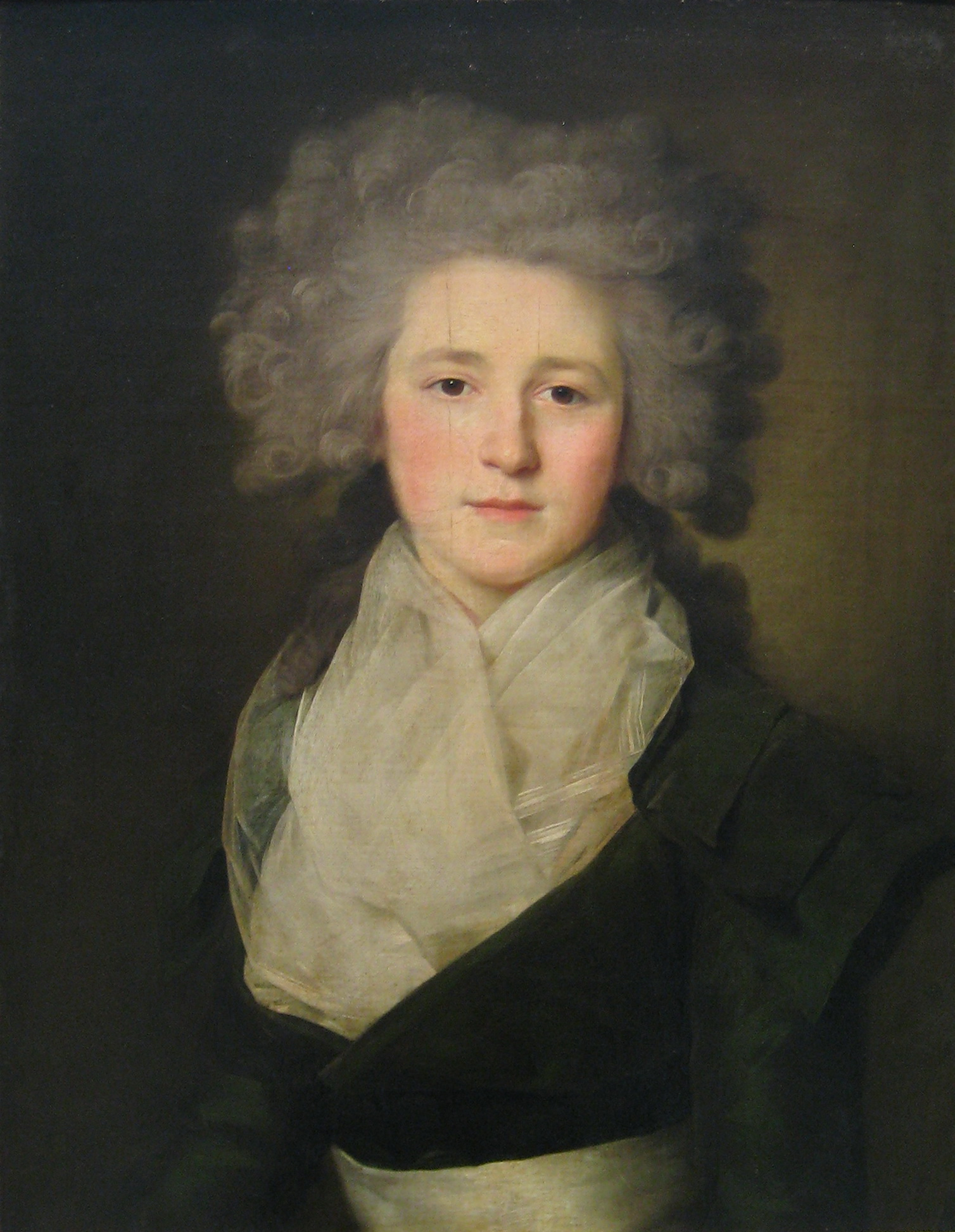 Анна Сергеевна Строганова (1765-1824), урожденная княгиня Трубецкая, - жена Г.А.Строганова. Согласно традиционной атрибуции, работа считалась портретом Е.П. Чичериной. Копия этого портрета хранится в дворце-музее Павловска